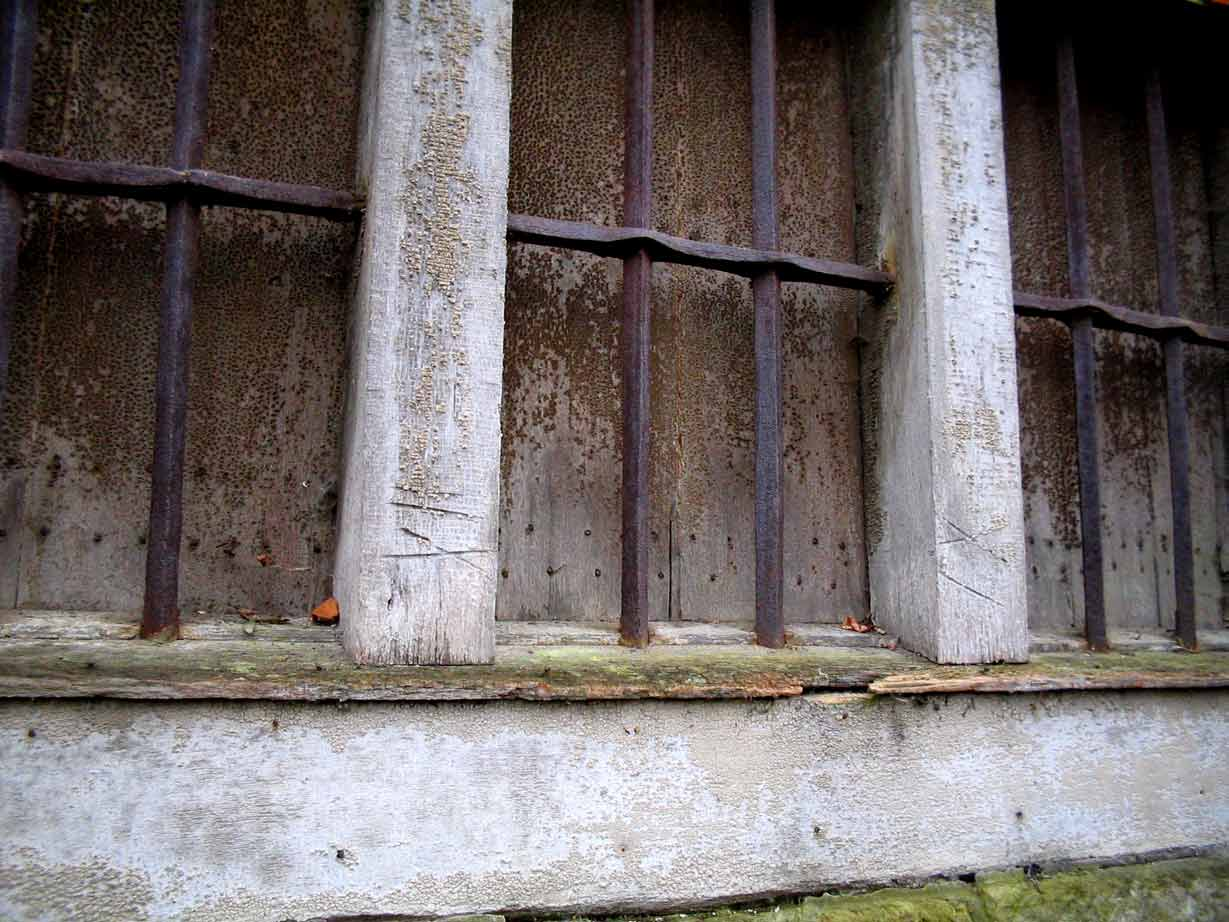 Tannerie Kalpers (Malmedy) : fenêtres du rez-de-chaussée équipées de barreaux. Volets intérieurs en bois.